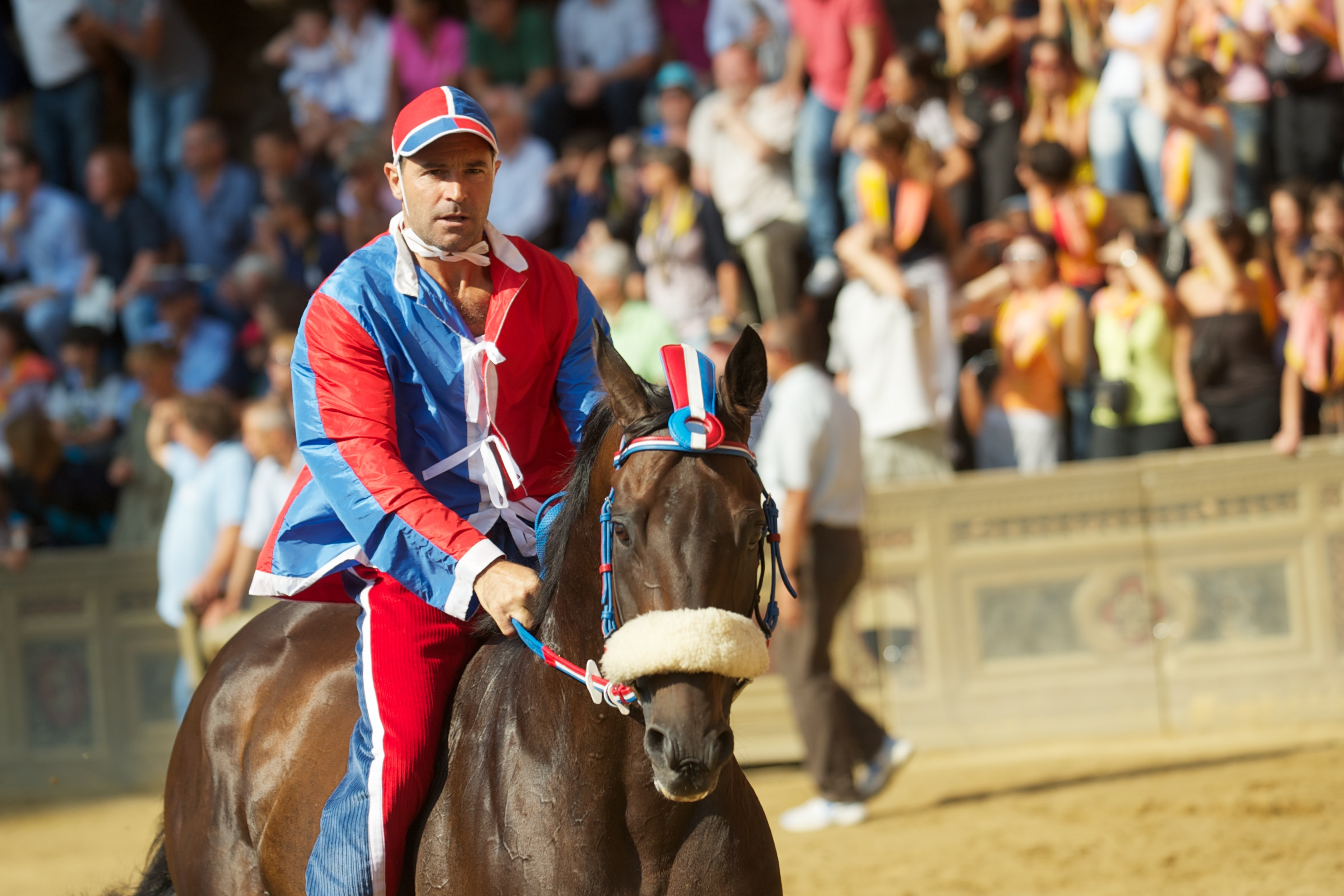 Pantera con Miguel montato da Luigi Bruschelli detto Trecciolino.